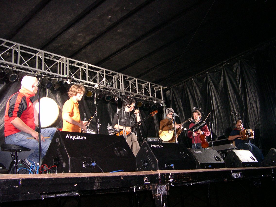 Felpeyu, grupu musica folk Asturies